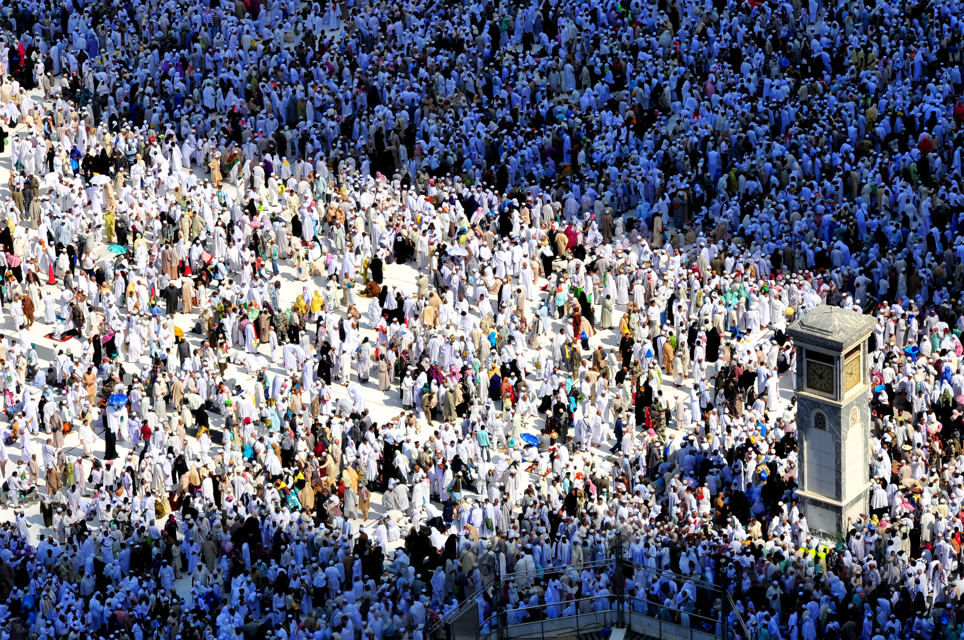 BRW_2857